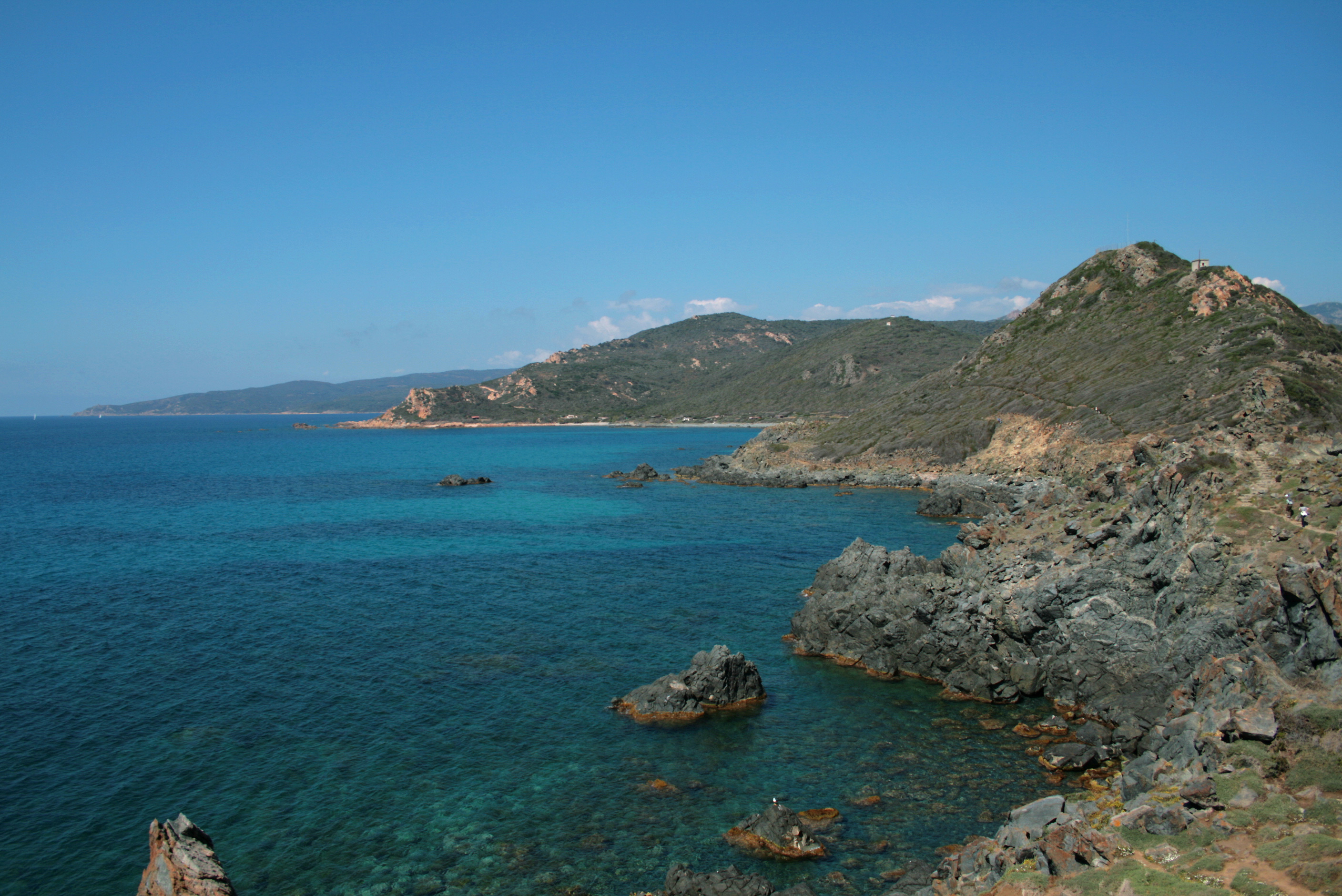 Ajaccio France, le Petit et le Grand Capo vus depuis la Pointe de la Parata.